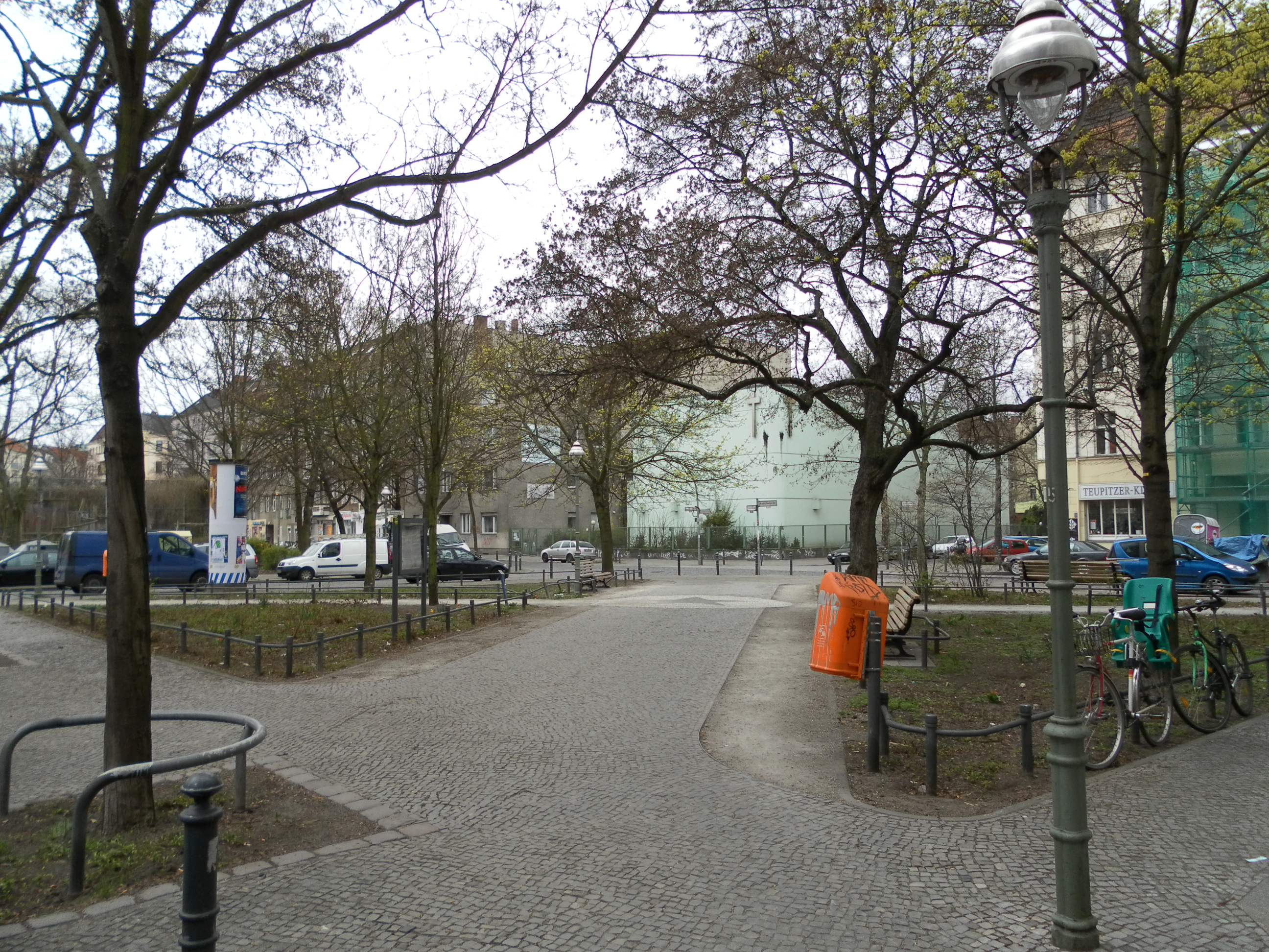 Esperantoplatz 12055 Berlin / Blick aus der Richtung S-Bahn Sonnenallee in Richtung Innenstadt